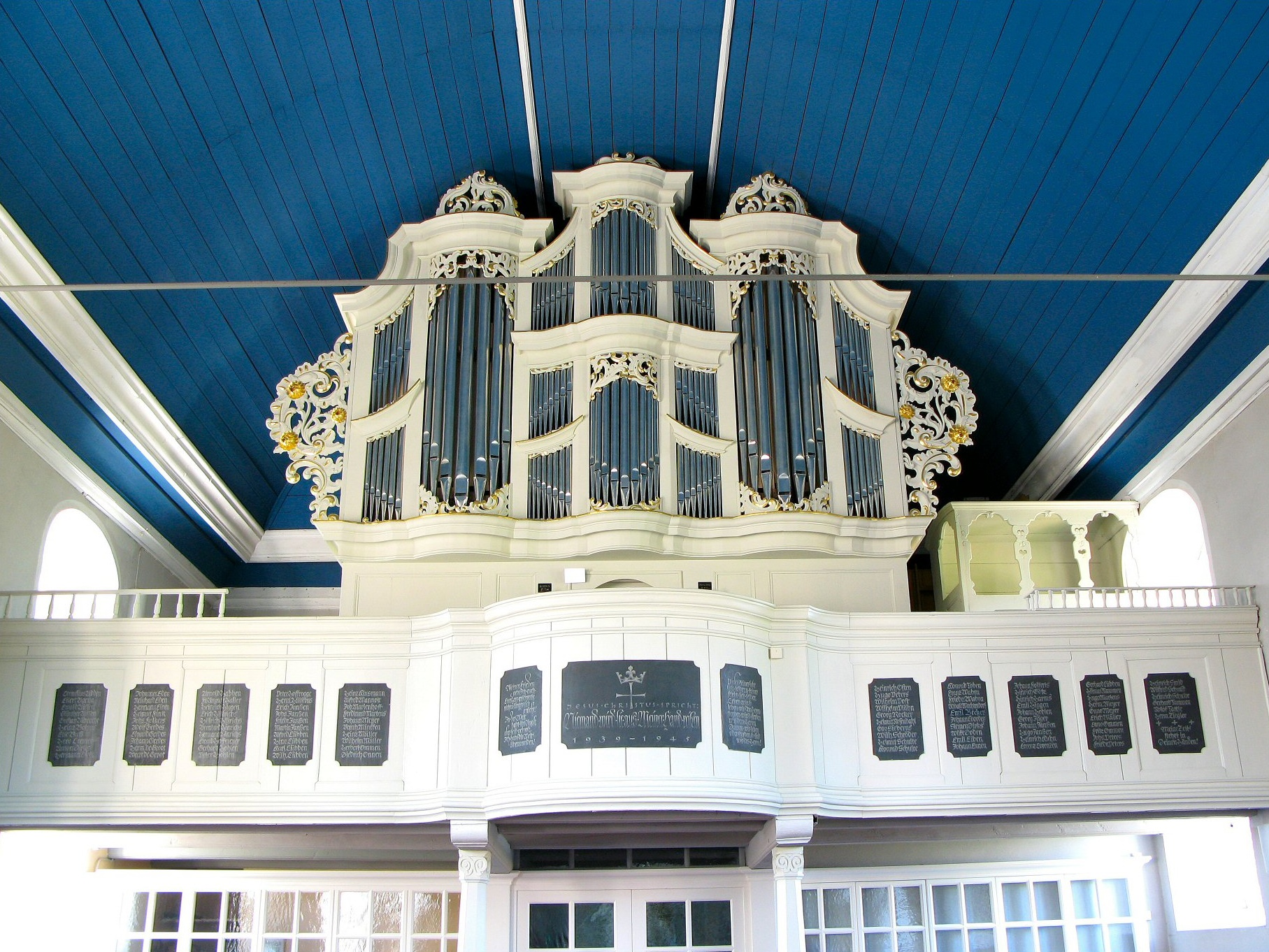 Orgel in Carolinensiel, Landkreis Wittmund